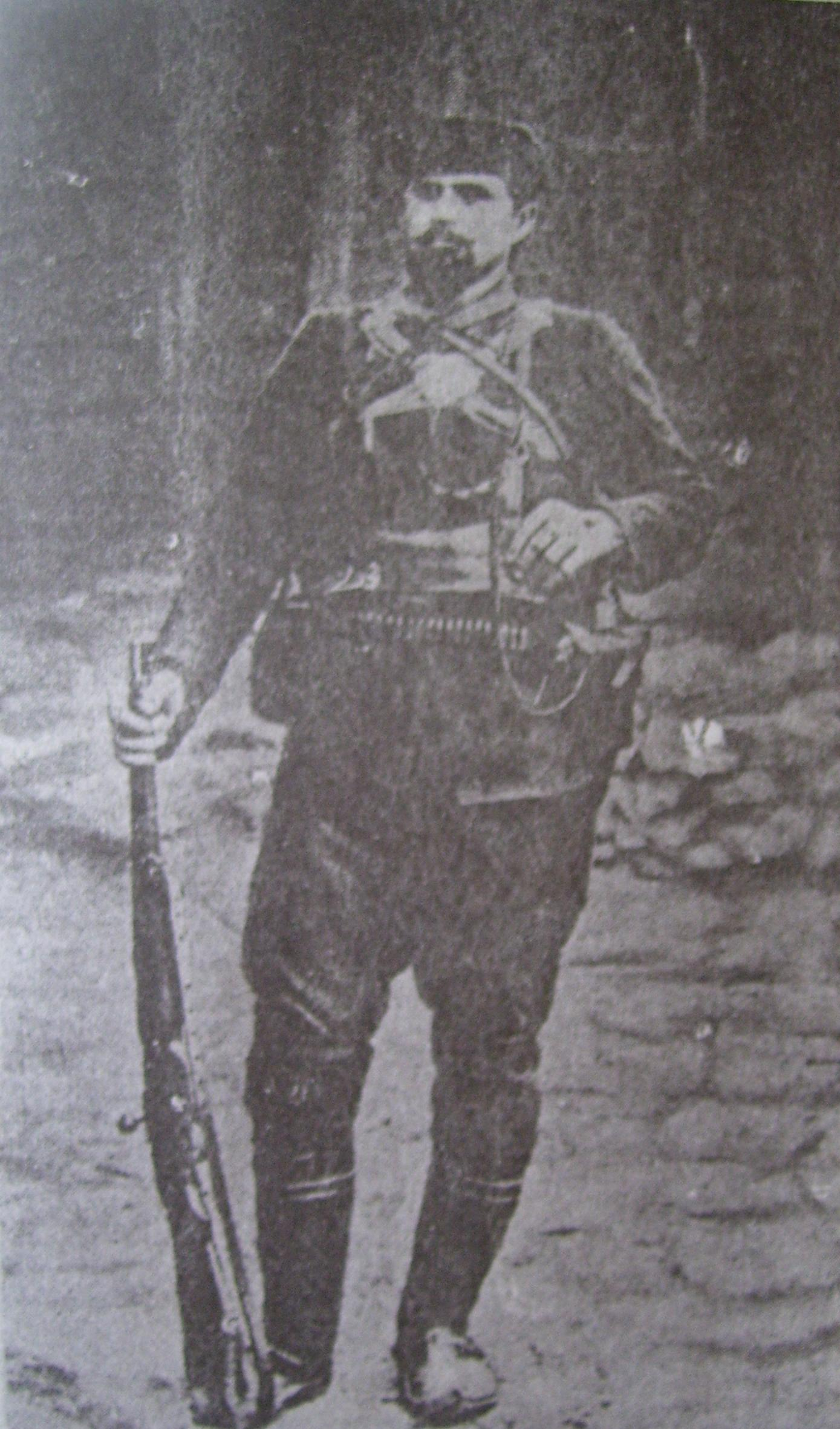 Димитър Димашев.